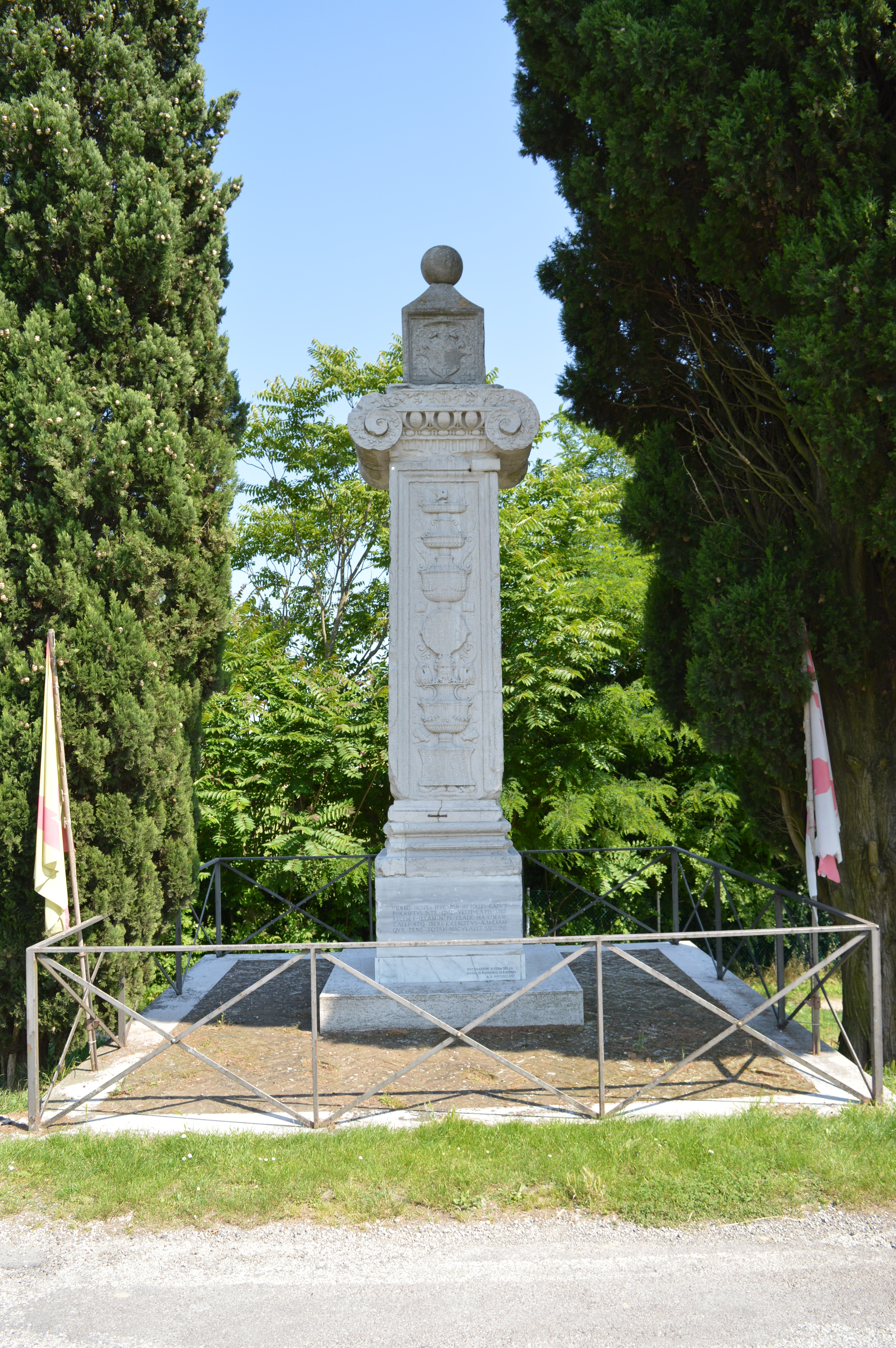 Colonna dei francesi in ricordo della battaglia di Ravenna del 1512 presso l'argine destro del fiume Ronco.